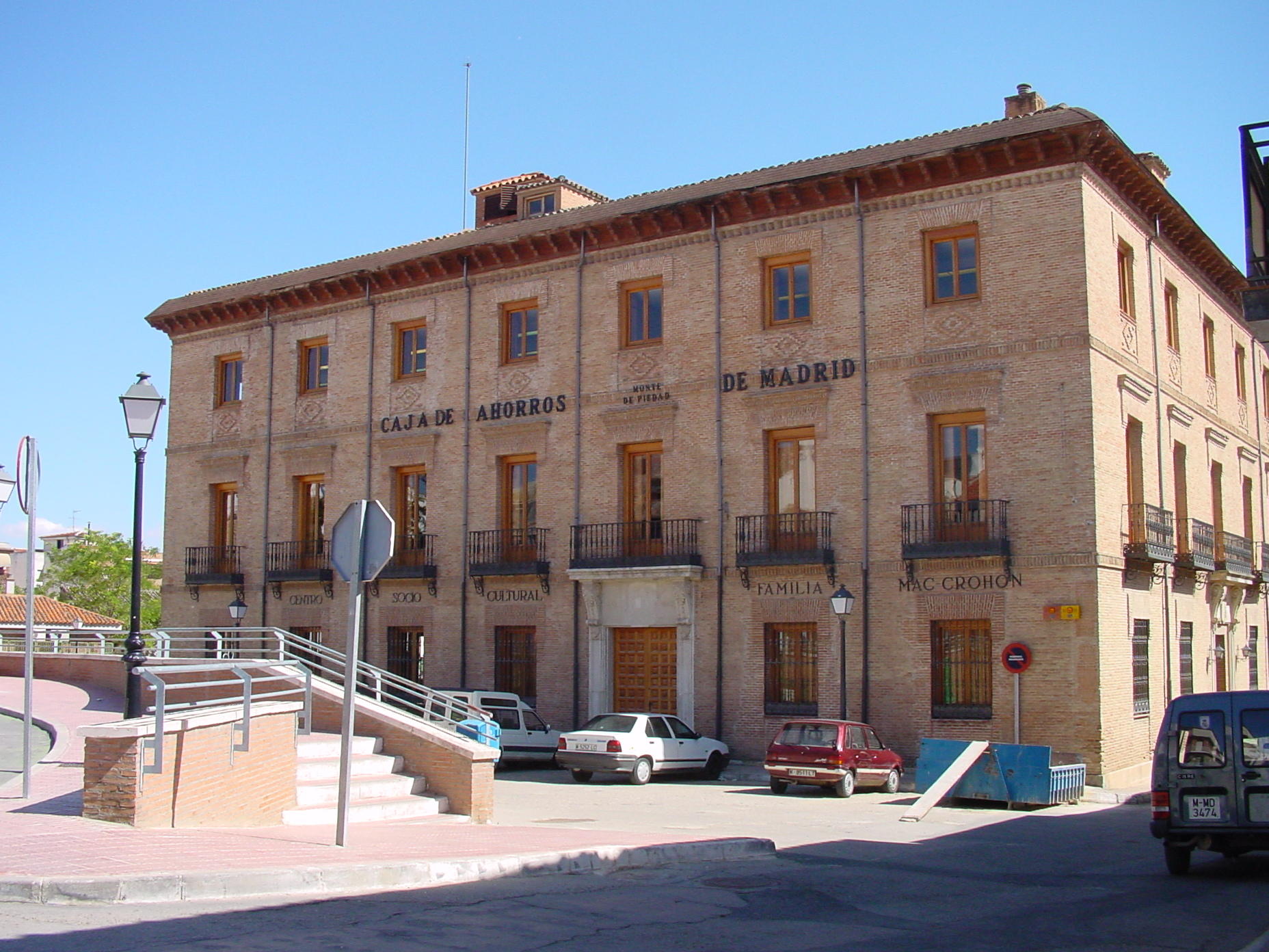 Edificio de la familia Mac Crohon en Morata de Tajuña.